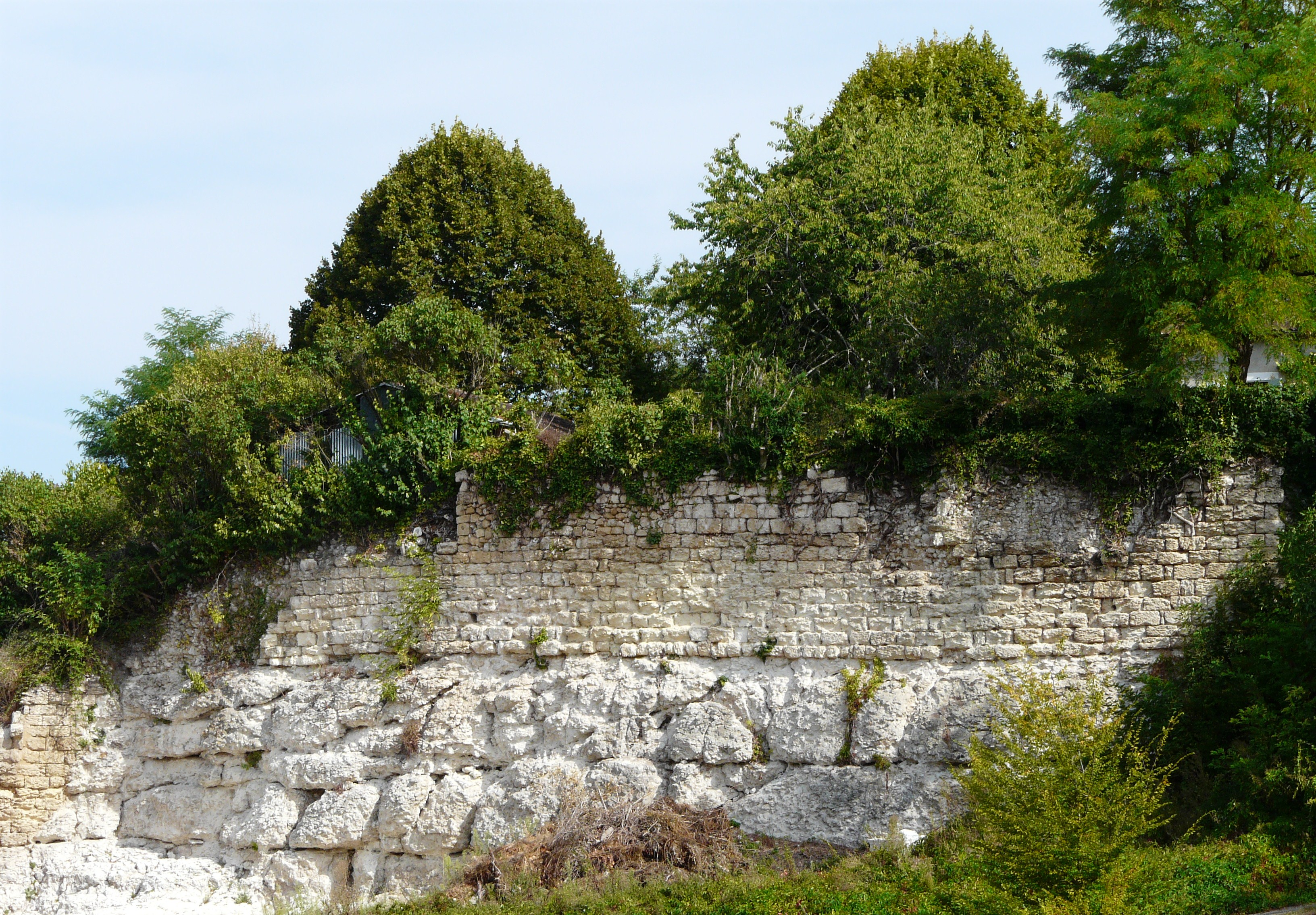 Vestiges des remparts de la première enceinte, château de Grignols, Dordogne, France.